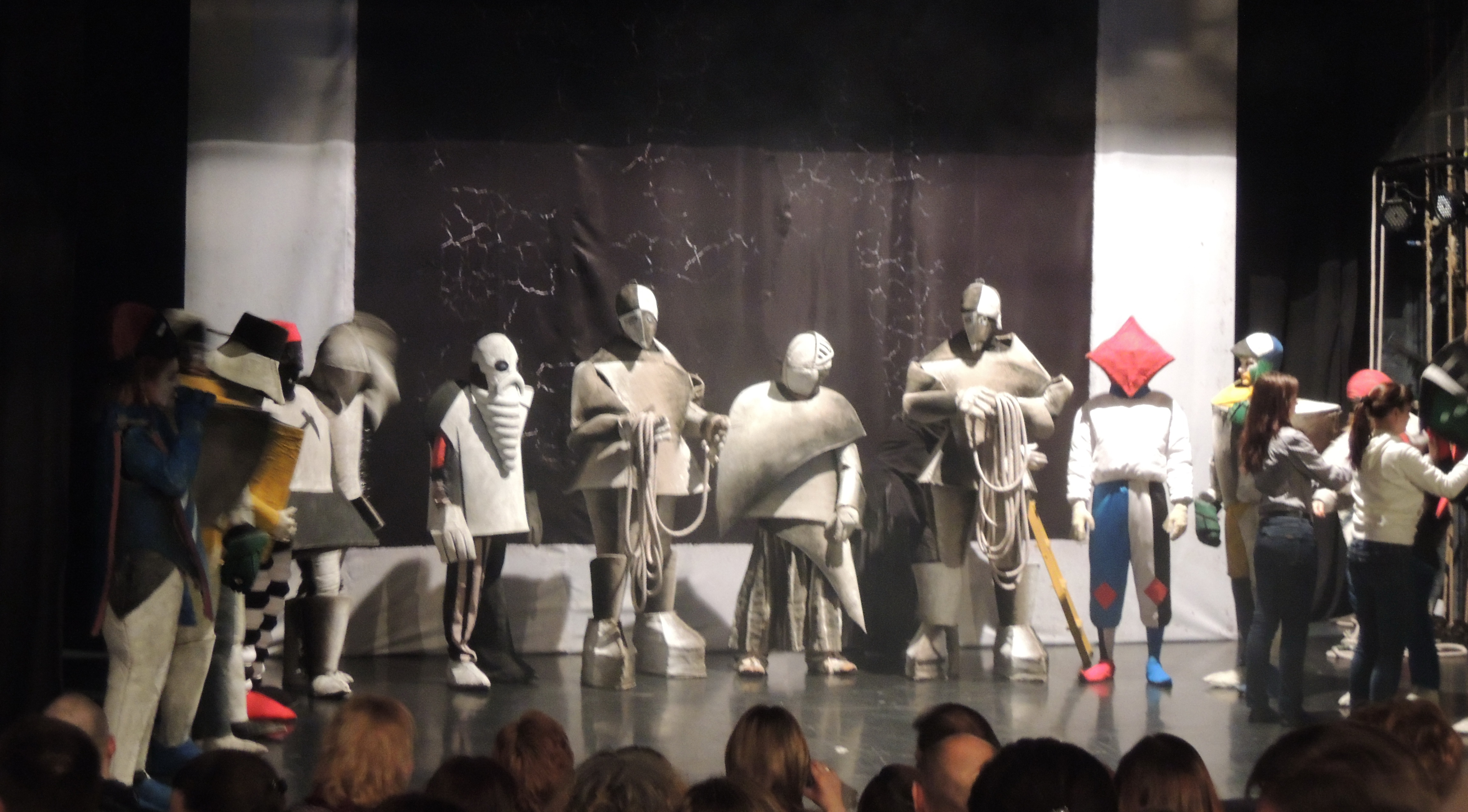 Победа над Солнцем, театр Стаса Намина, 2014